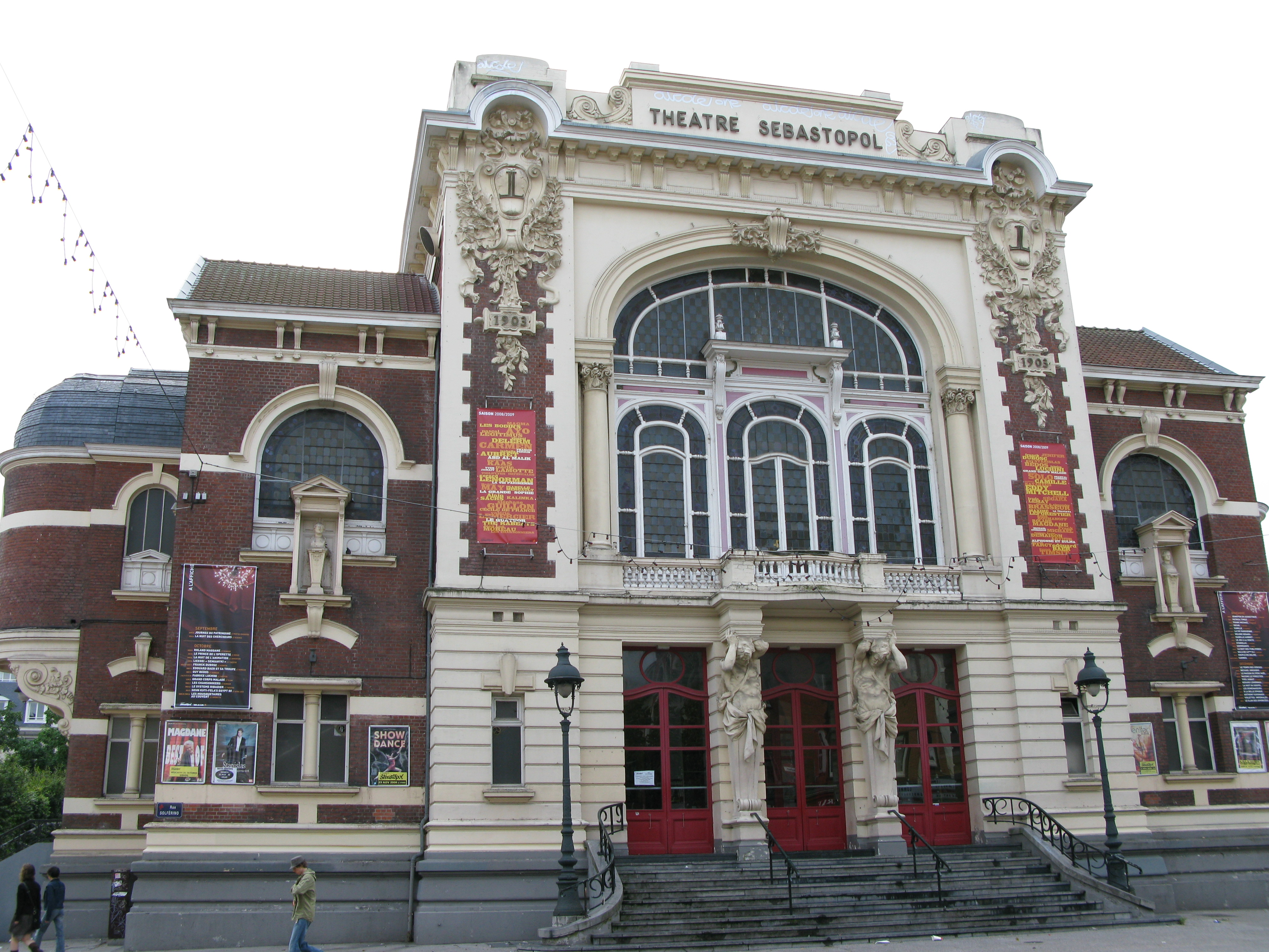 Théâtre Sébastopol, vu de face, à Lille